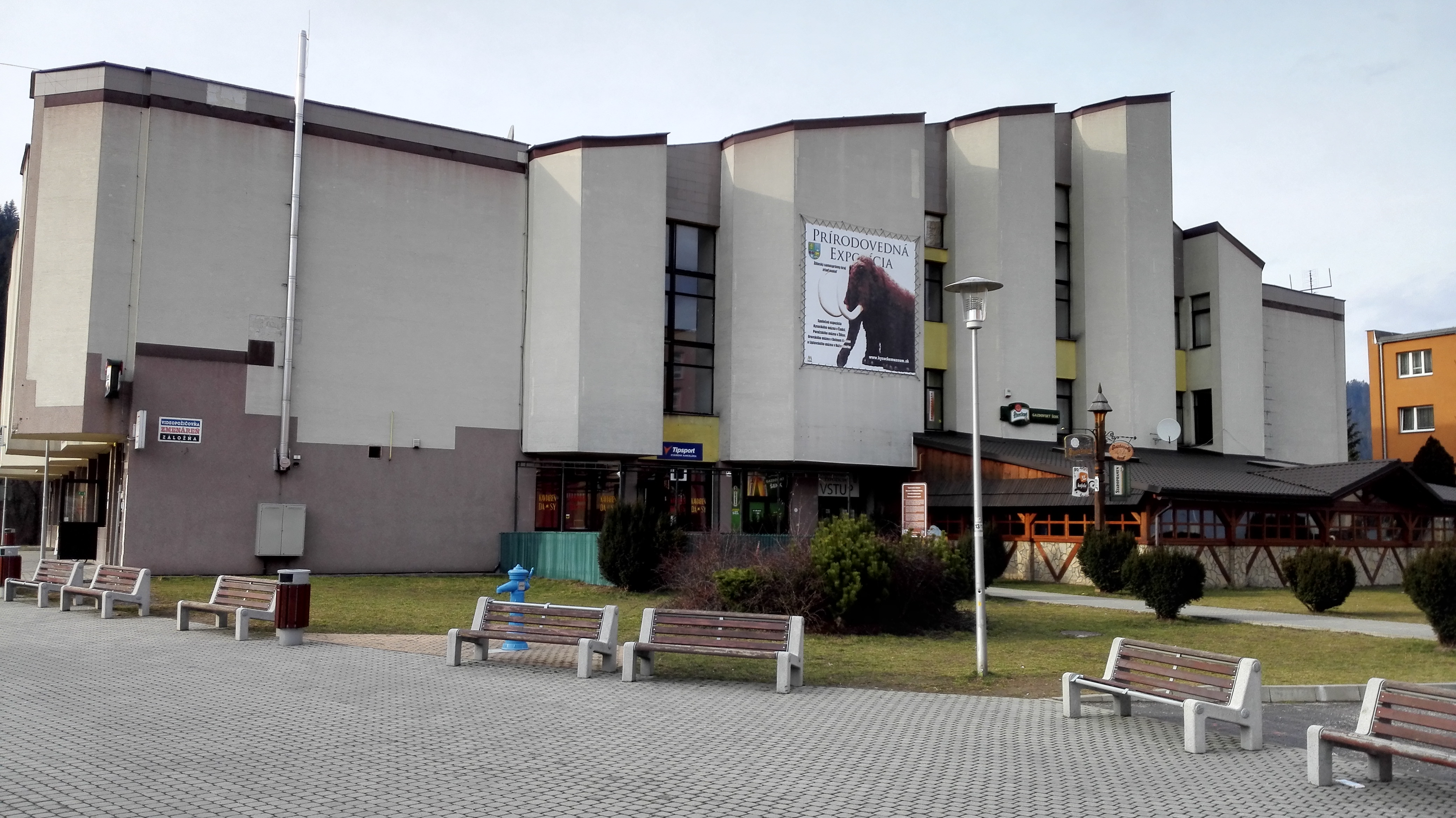 Budova Domu Kultúry v Krásne nad Kysucou, postavená v rokoch 1985 - 1999.